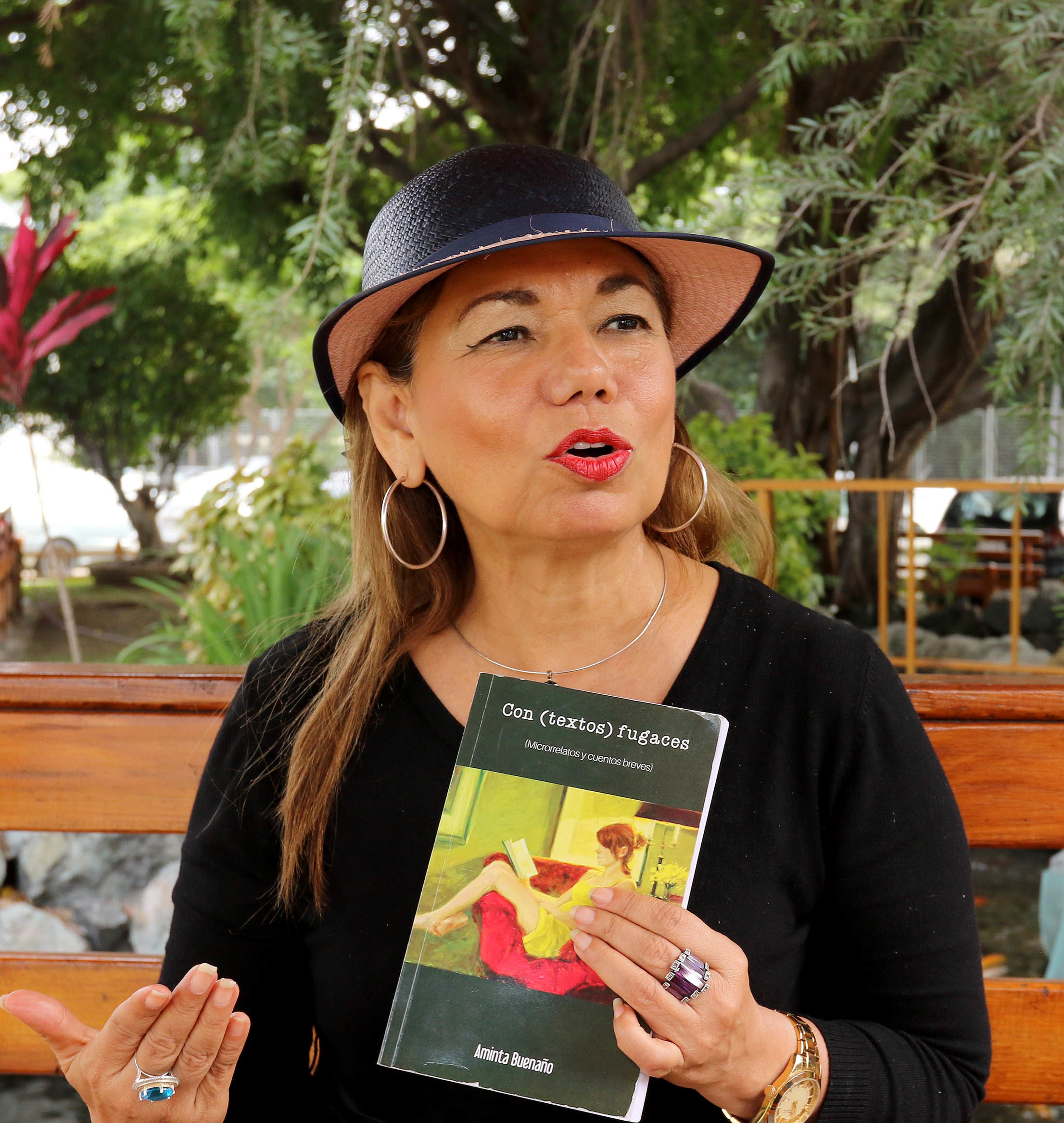 Guayaquil, jueves 12 julio del 2018 (Andes).-La escritora y diplomática, Aminta Buenaño presenta su libro titulado "Con textos Fugaces". Foto:César Muñoz/Andes Guayaquil, jueves 12 de julio del 2018 (Andes).-La escritora y diplomática, Aminta Buenaño presenta su libro titulado "Con textos Fugaces".